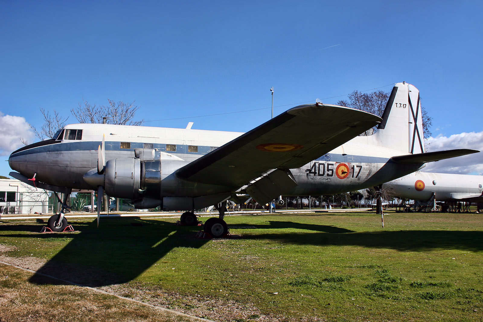 Madrid - Cuatro Vientos (LECU/LEVS)